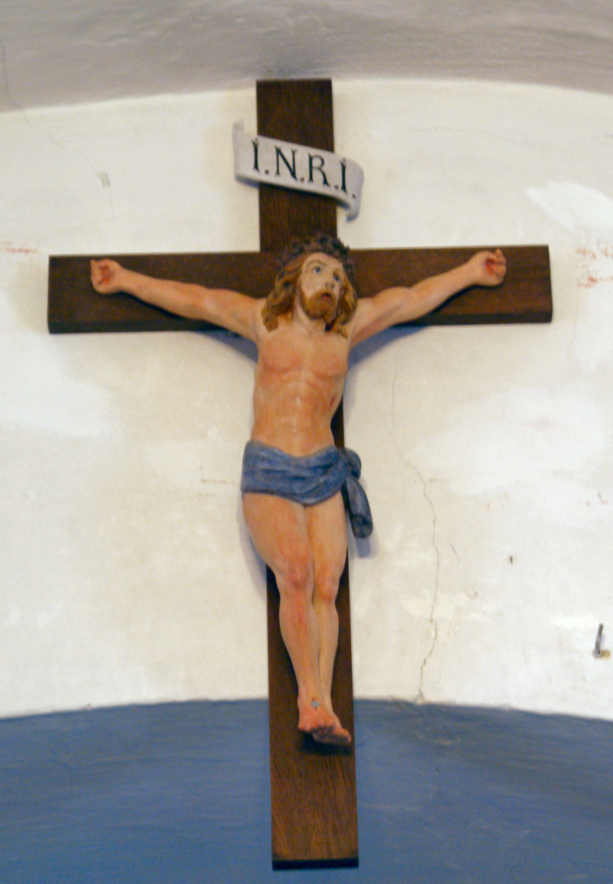 Odden Kirke, krucifiks fra 1800-tallet